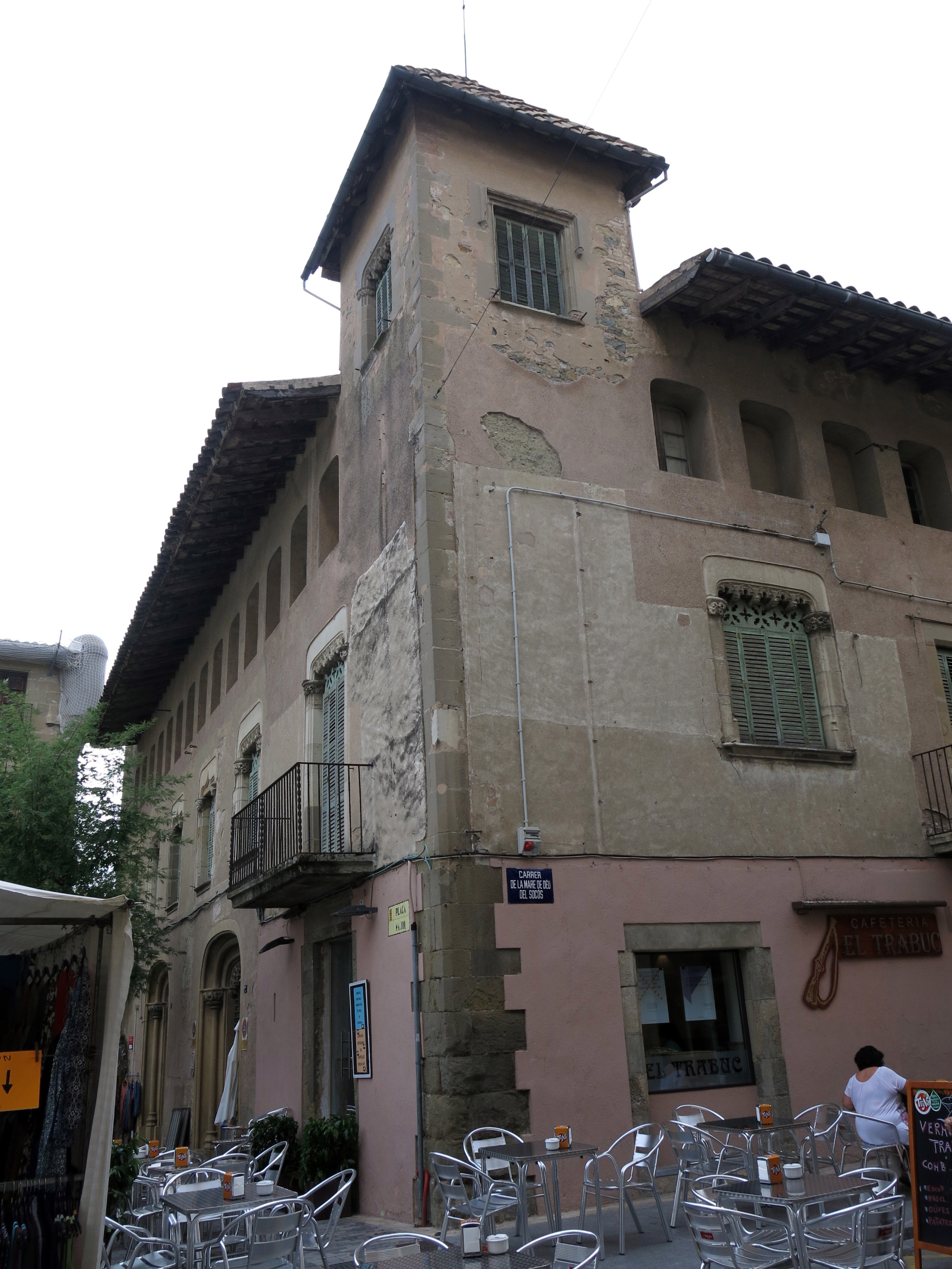 Casa Domingo, c. Mare de Déu dels Socors - plaça Major (Centelles)